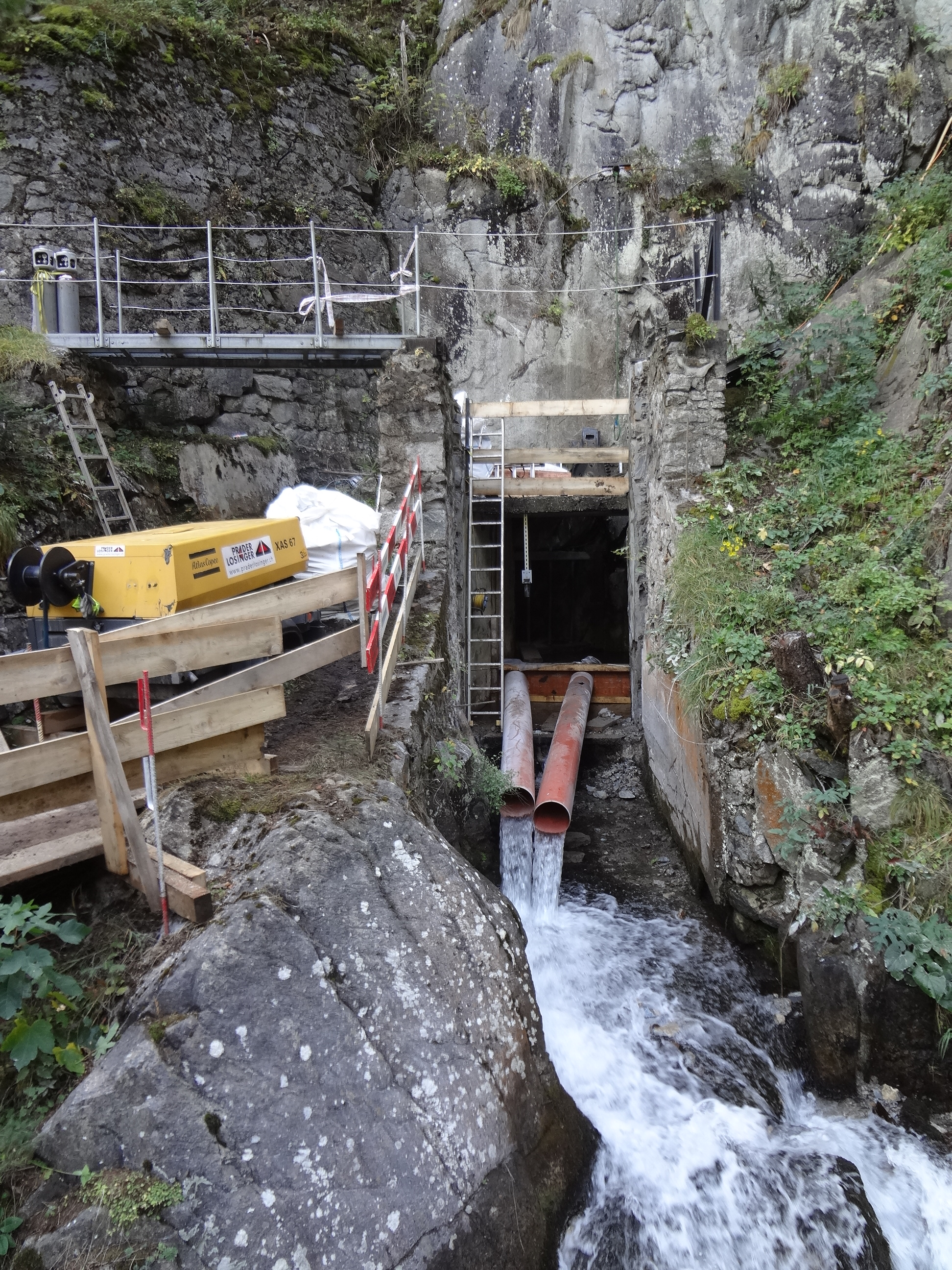 Captage des eaux de la Salanfe à Salvan pour l'aménagement hydroélectrique de la Pissevache à Vernayaz. Chantier de rénovation en 2015.